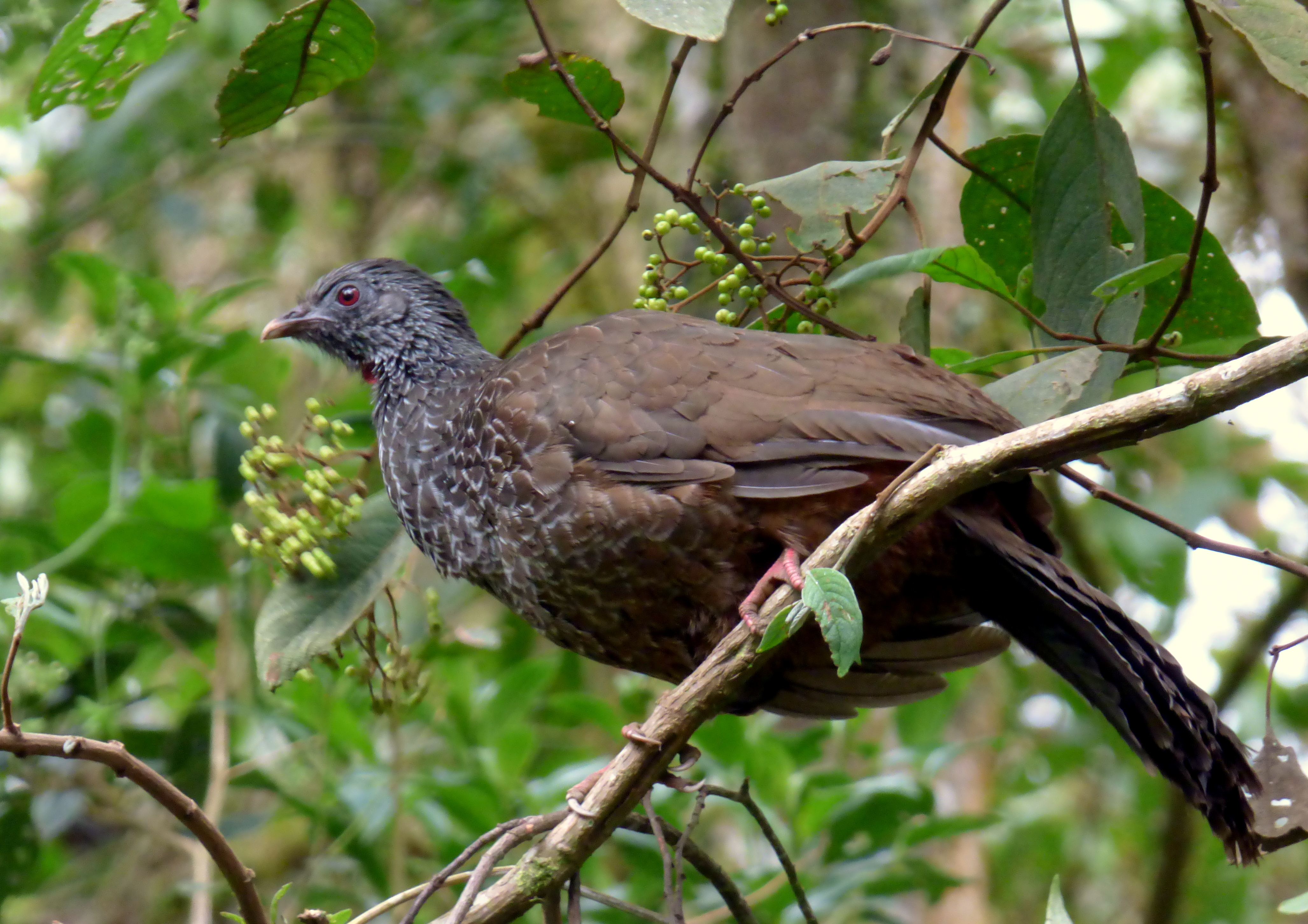 Penelope montagni (Pava andina)